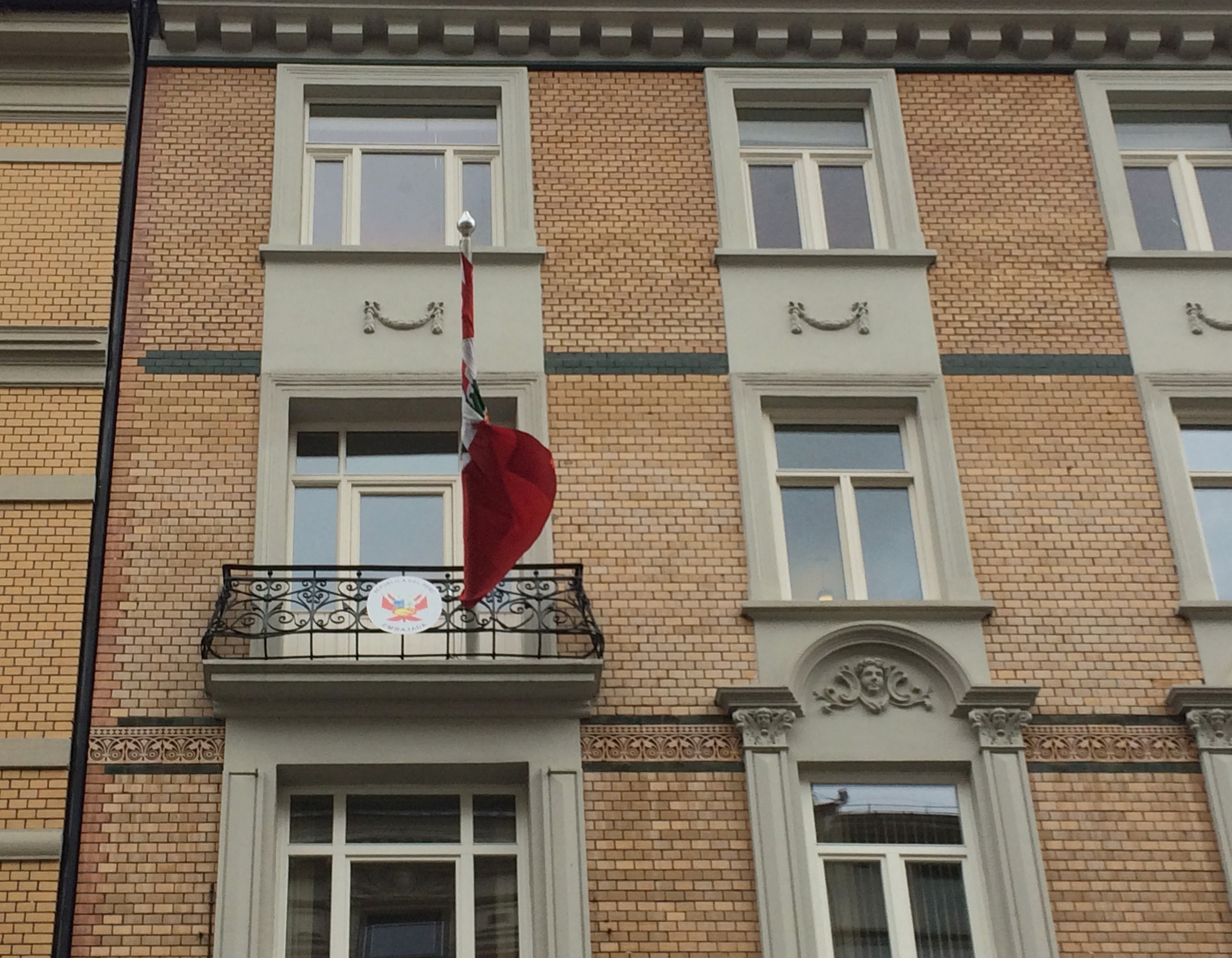 Perus ambassade i Oslo, Arbins gate 2